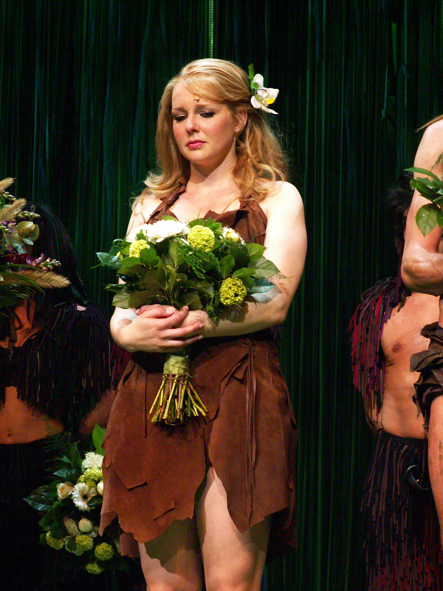 Dutch TV presenter Chantal Janzen